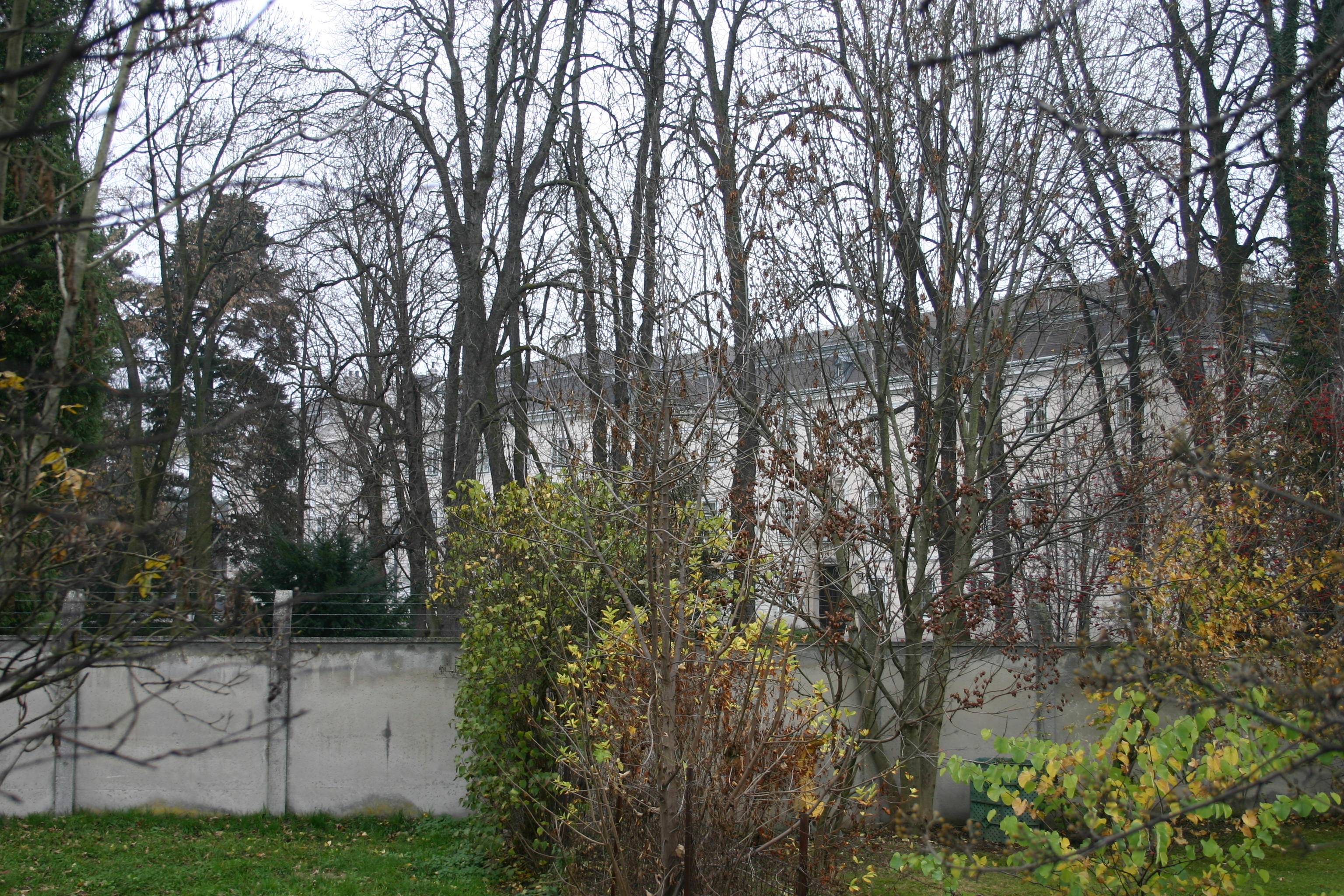 Schwarzau am Steinfeld, Justizanstalt Schwarzau, Straßenansicht